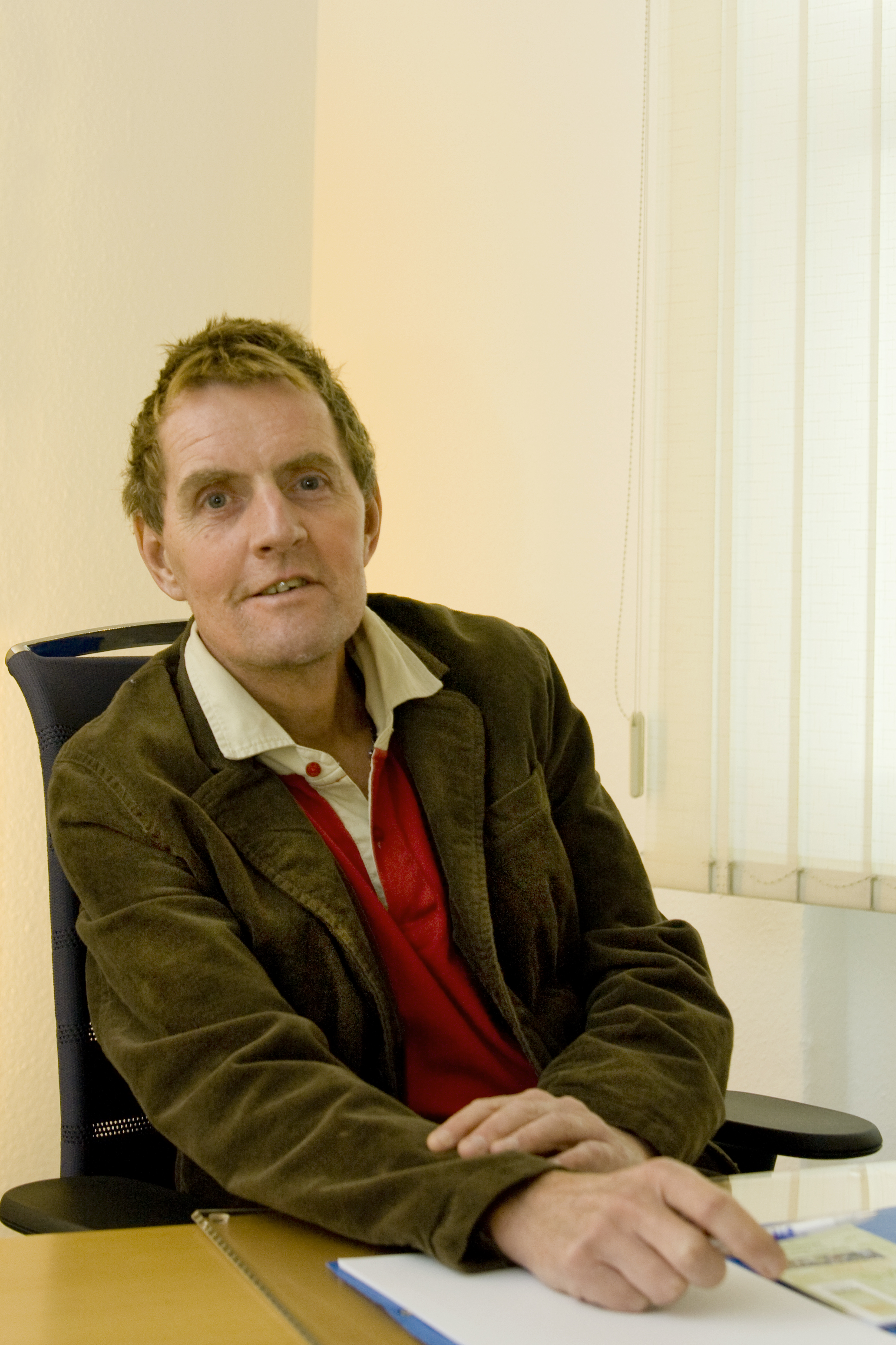 Univ.-Prof. Dr. Holger Burckhart, Rektor der Universität Siegen